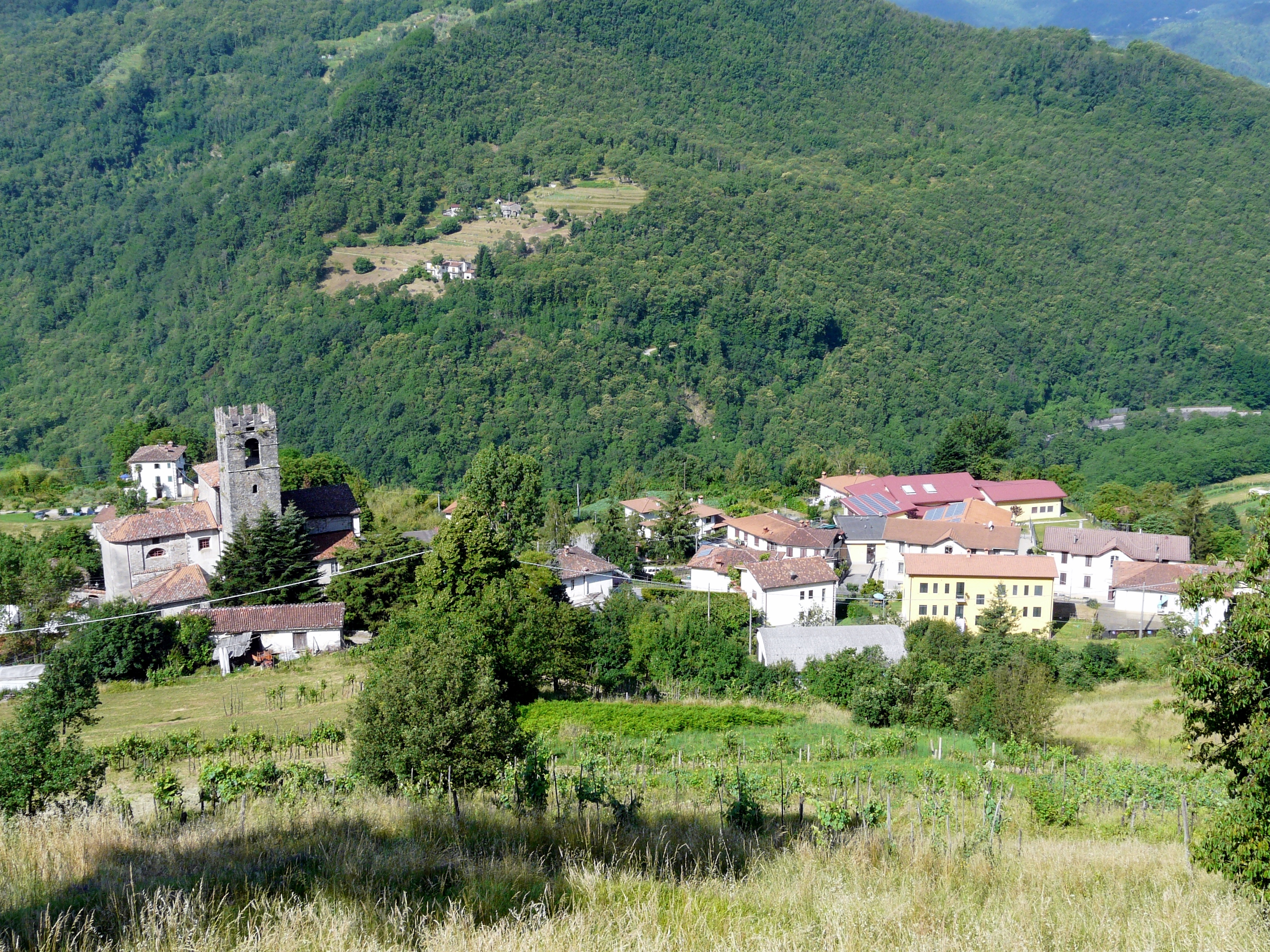 Migliano (Fosciandora), Toscana, Italia